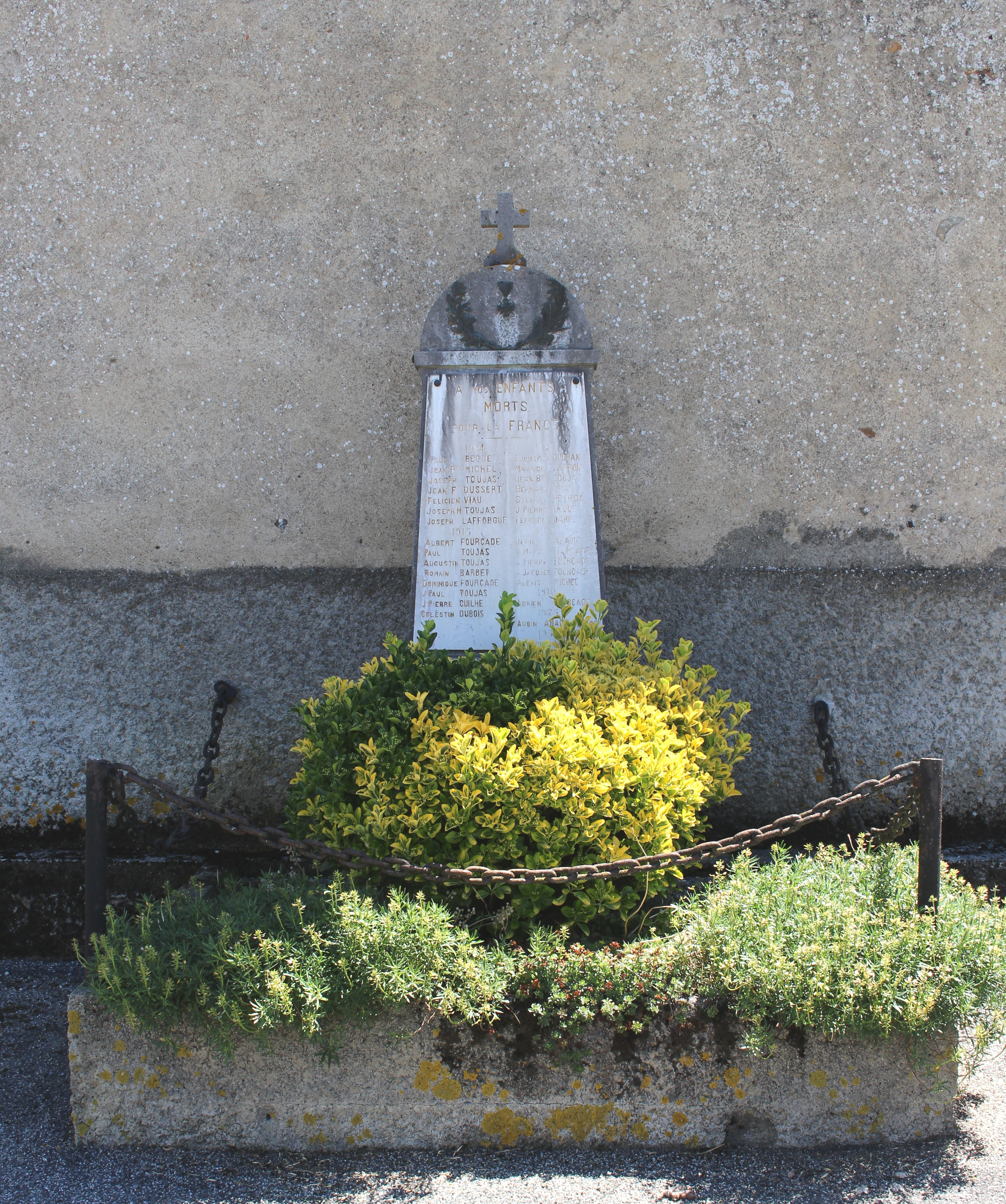 Monument aux morts de Bourg-de-Bigorre (Hautes-Pyrénées)